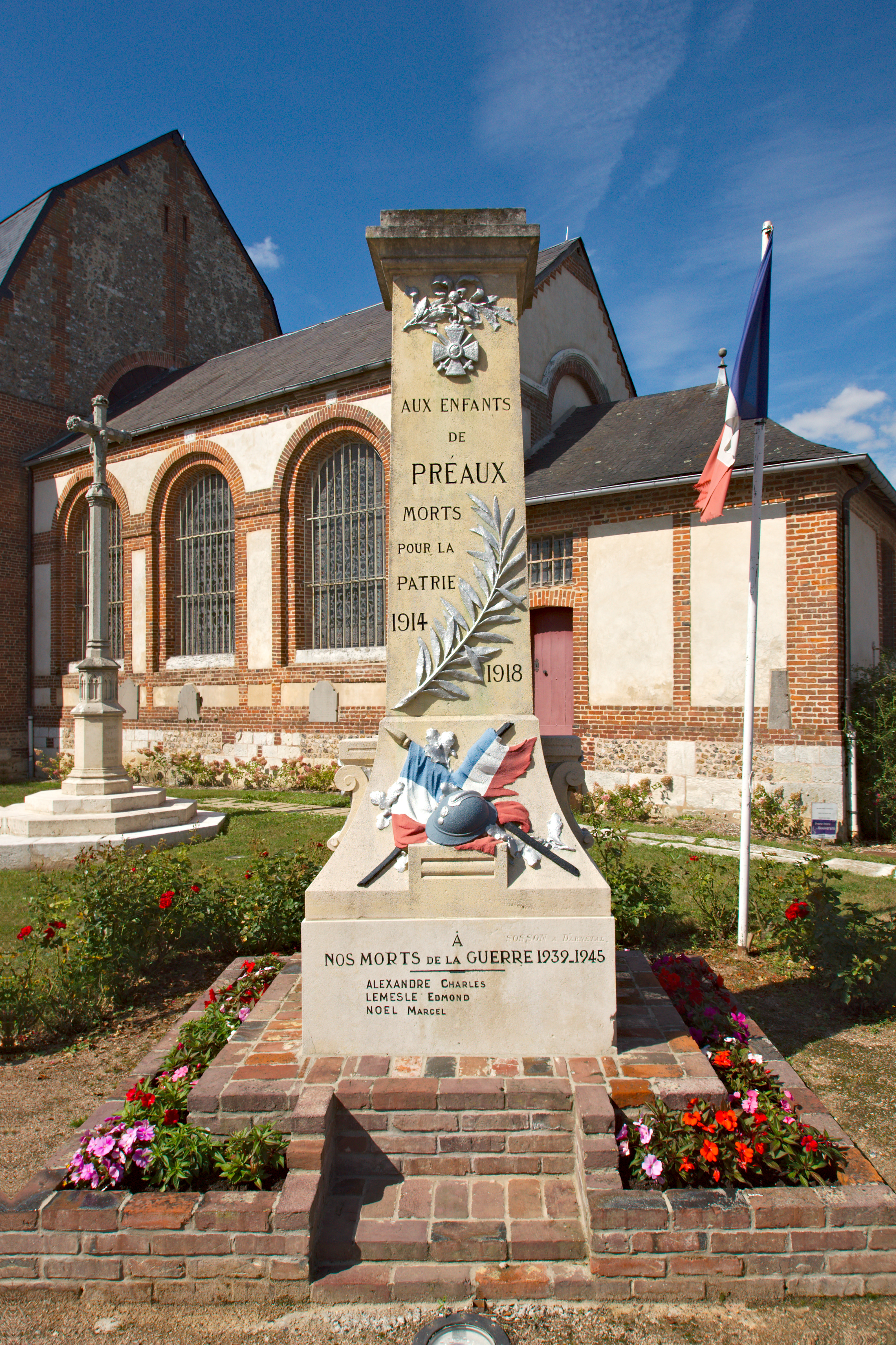 Monument aux morts rue du Bourg à Préaux